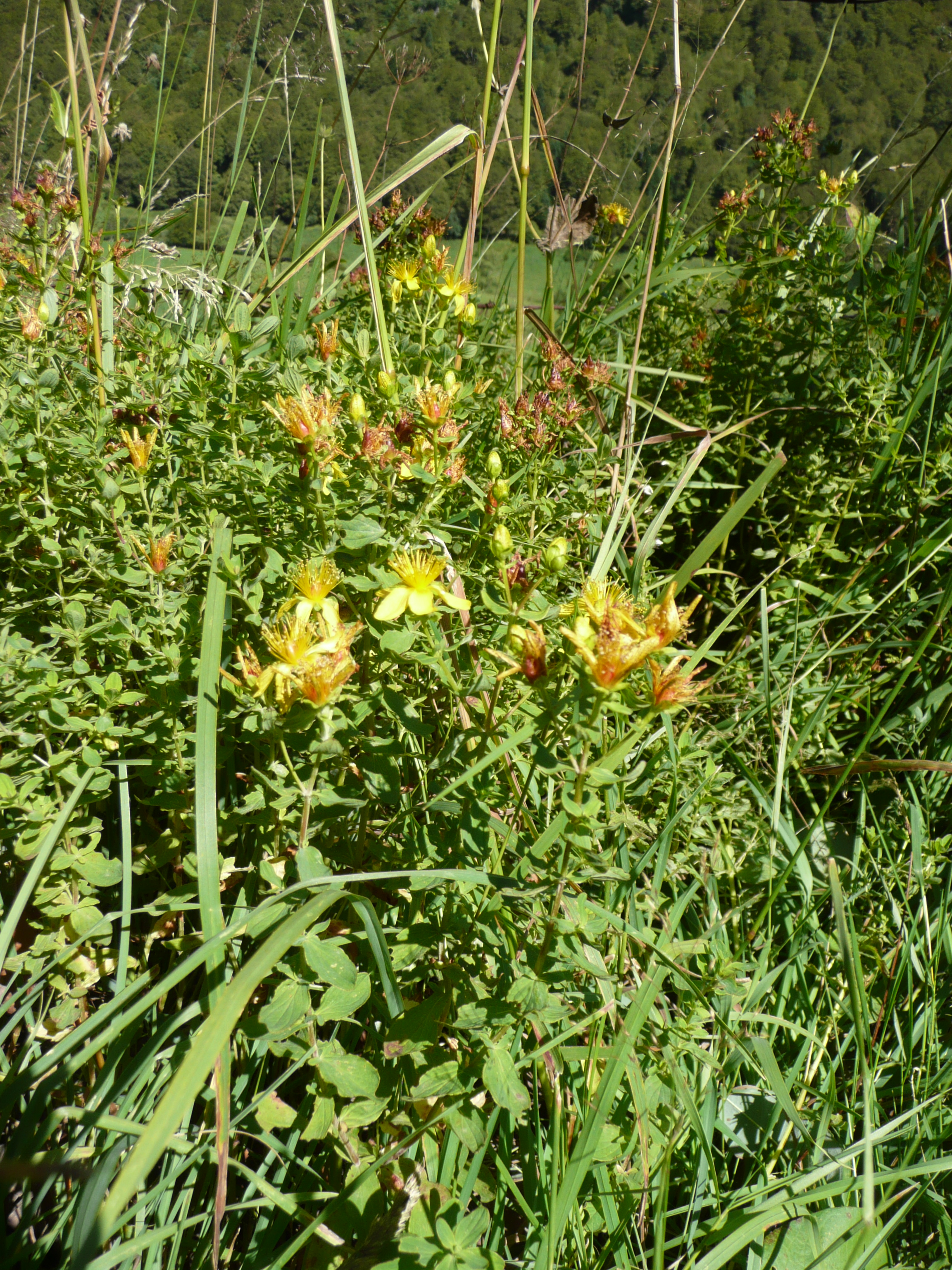 Millepertuis à quatre angles (Hypericum tetrapterum) dans la Réserve naturelle de la vallée de Chaudefour. Plante identifiée par le Conservateur de la réserve, Eric Vallet, lors d'une visite organisée d'une journée dans la reserve. Map: 45° 32' 11" N 02° 51' 10" E